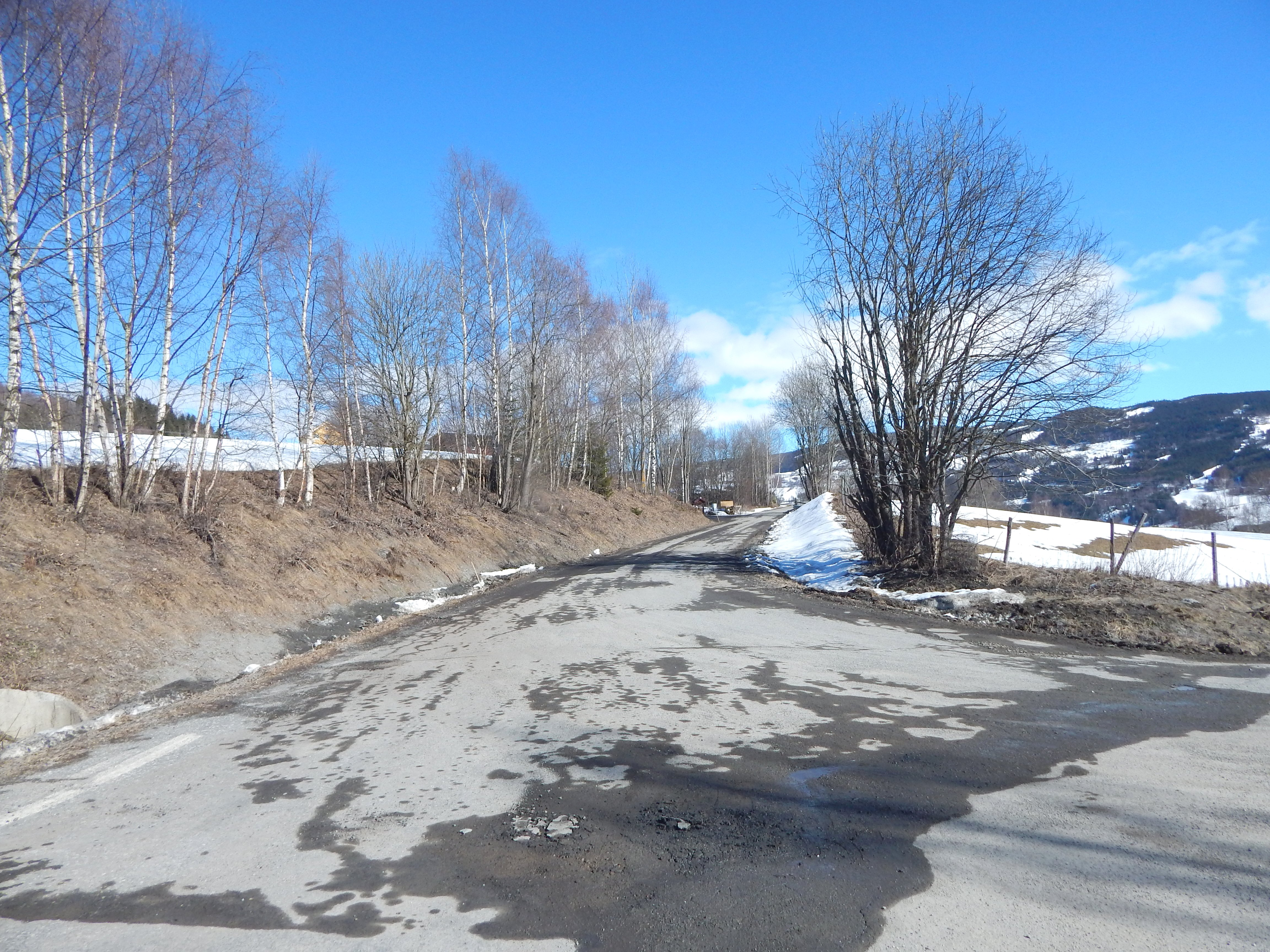 Østenden av Polavegen (fylkesvei 365) nede ved primær fylkesvei 254